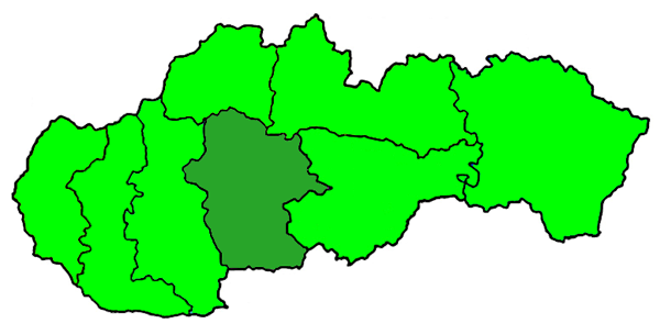 Mappa della diocesi cattolica (roman catholic) di Banska Bystrica, in Slovacchia. Lavoro personale.